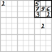 Sudoku